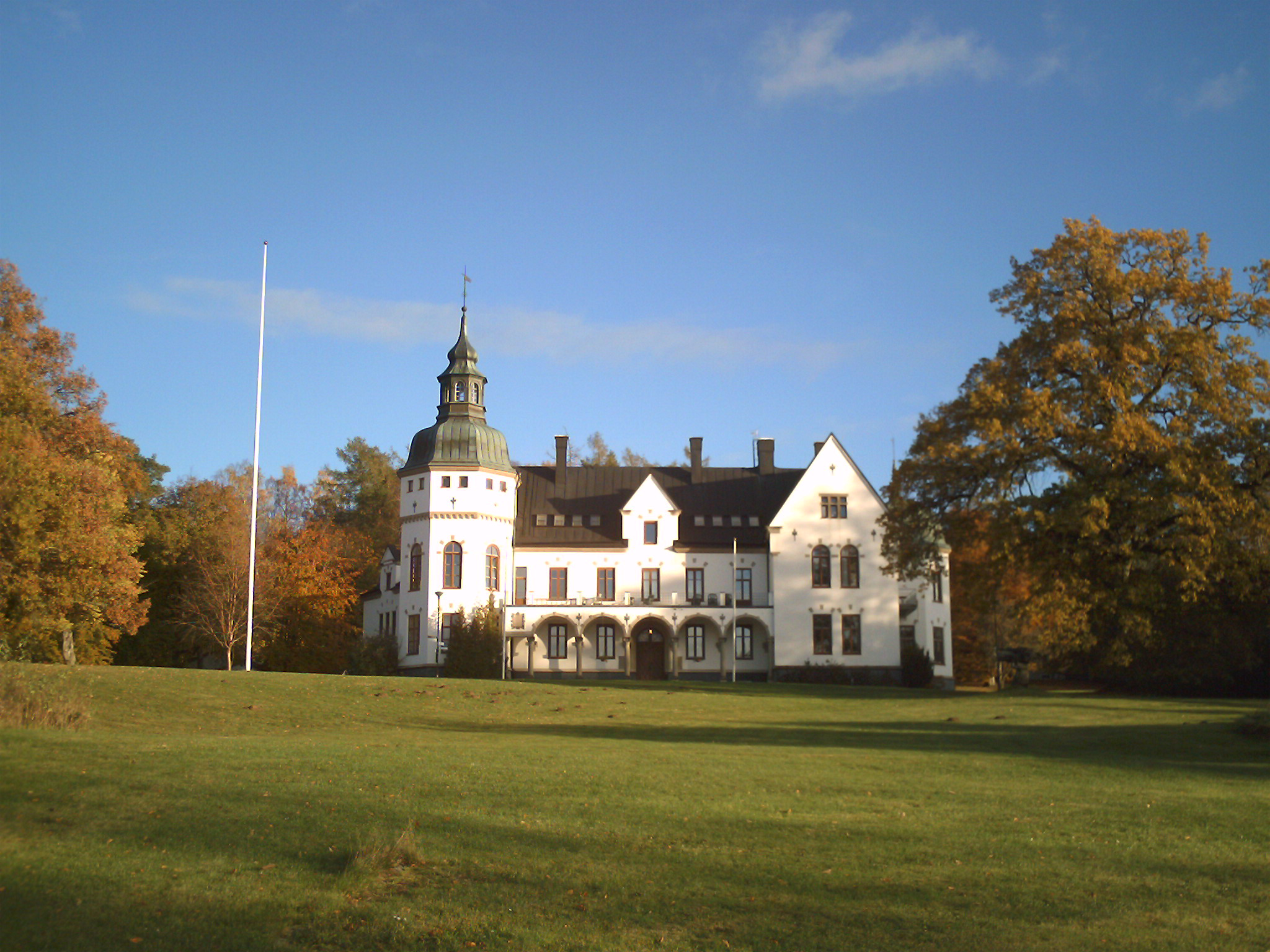 Hellidens slott Tidaholm. Slottet används som matsal samt elevinternat av Hellidens folkhögskola.